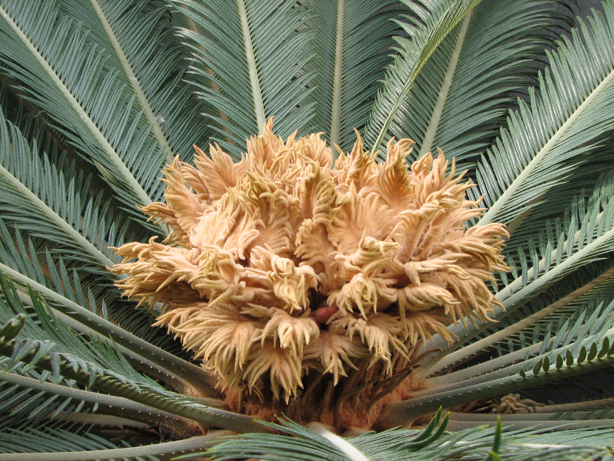 Cycas revoluta Thunb. - female megasporophyls (Botanická zahrada PřF MU)